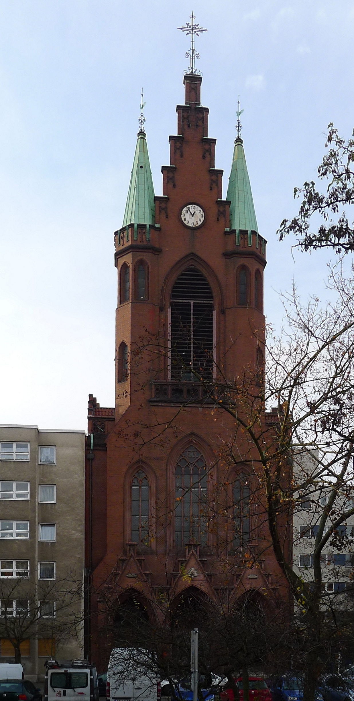 Blick auf die Fassade